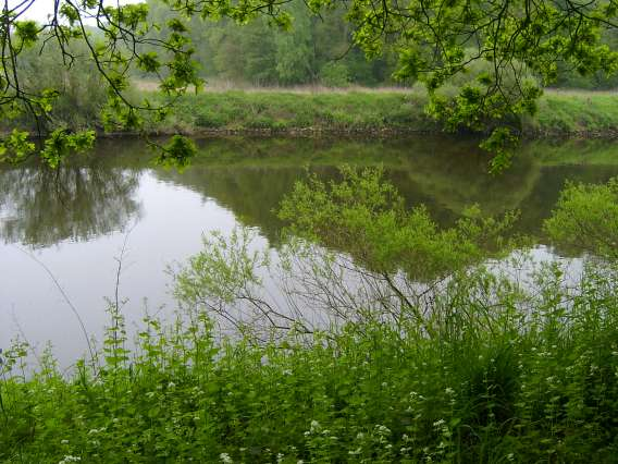 das Bild ist selbst fotografiert, ist GNU-FDL und zeigt die Ems zwischen Emsbüren und Salzbergen